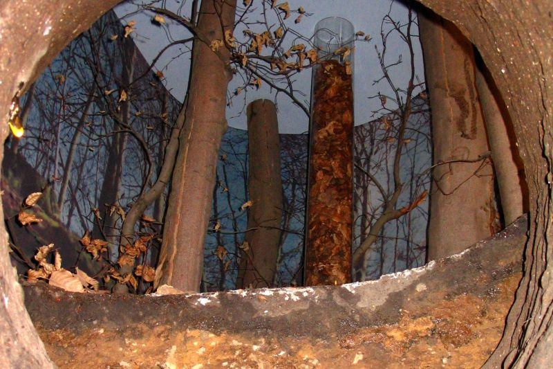 Ein Teil der Daueraustellung "Unter.Welten" des Museums am Schölerberg Osnabrück.